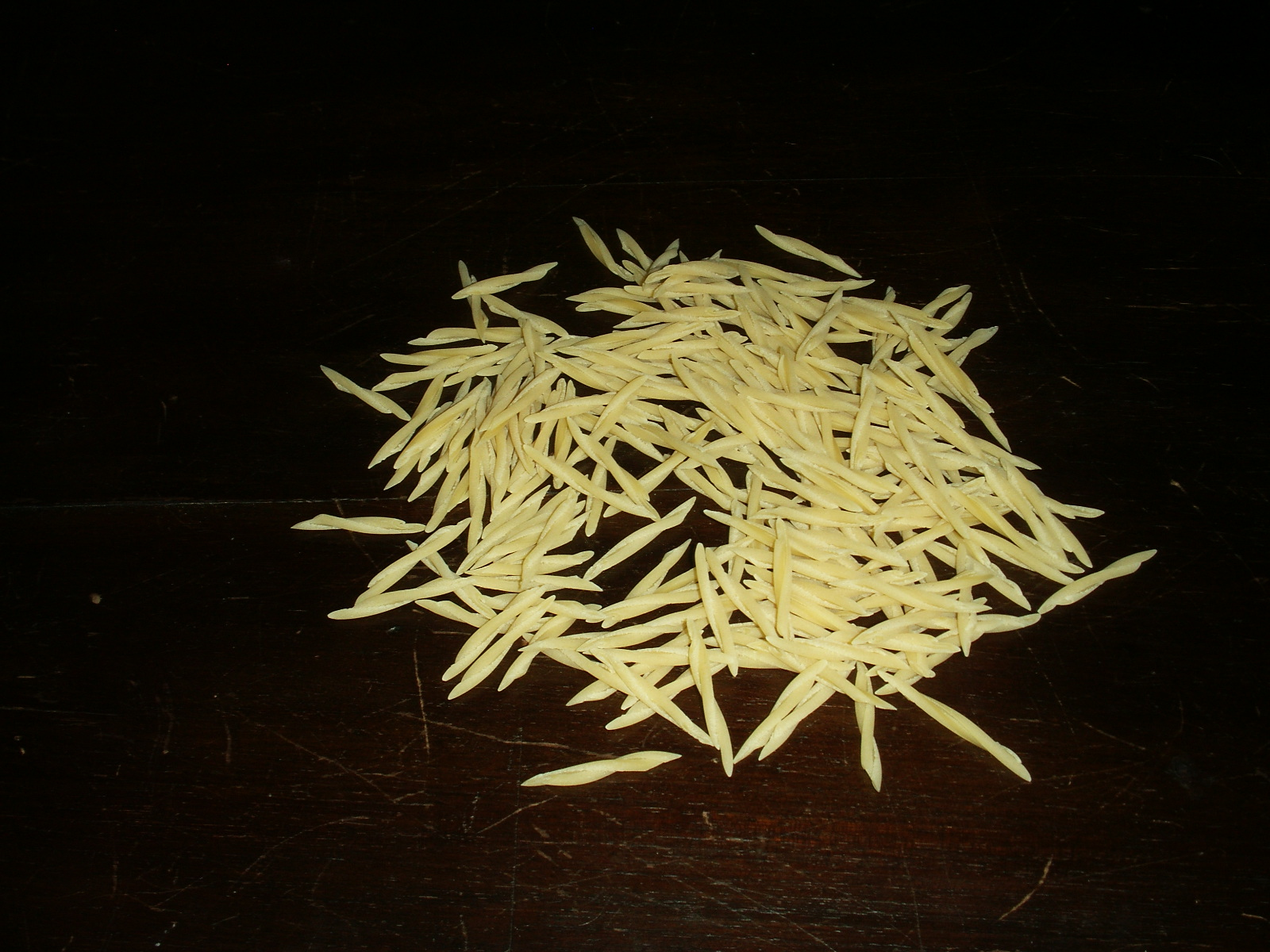 Trofie